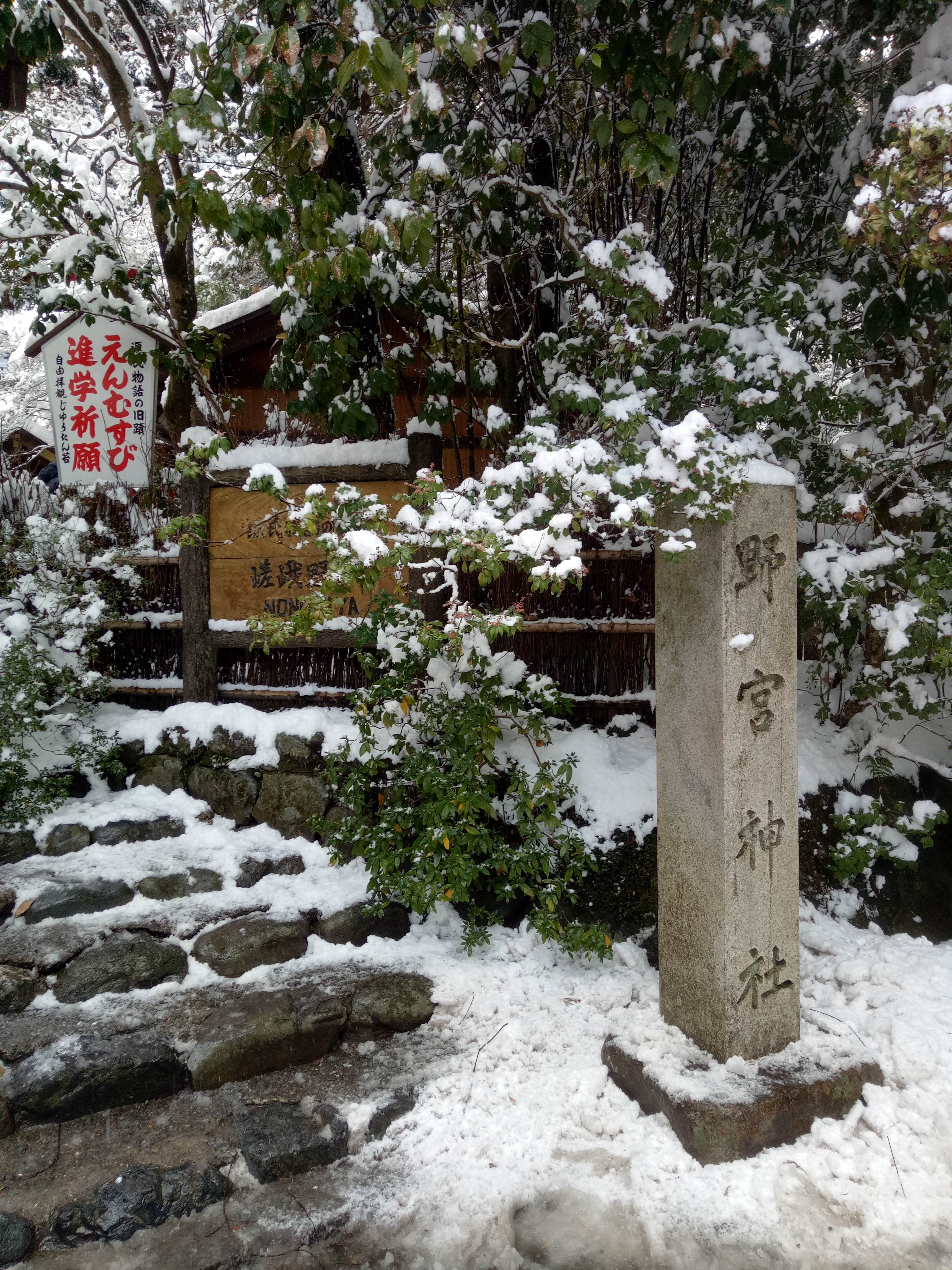 野宮神社，位於日本京都嵯峨野地區。